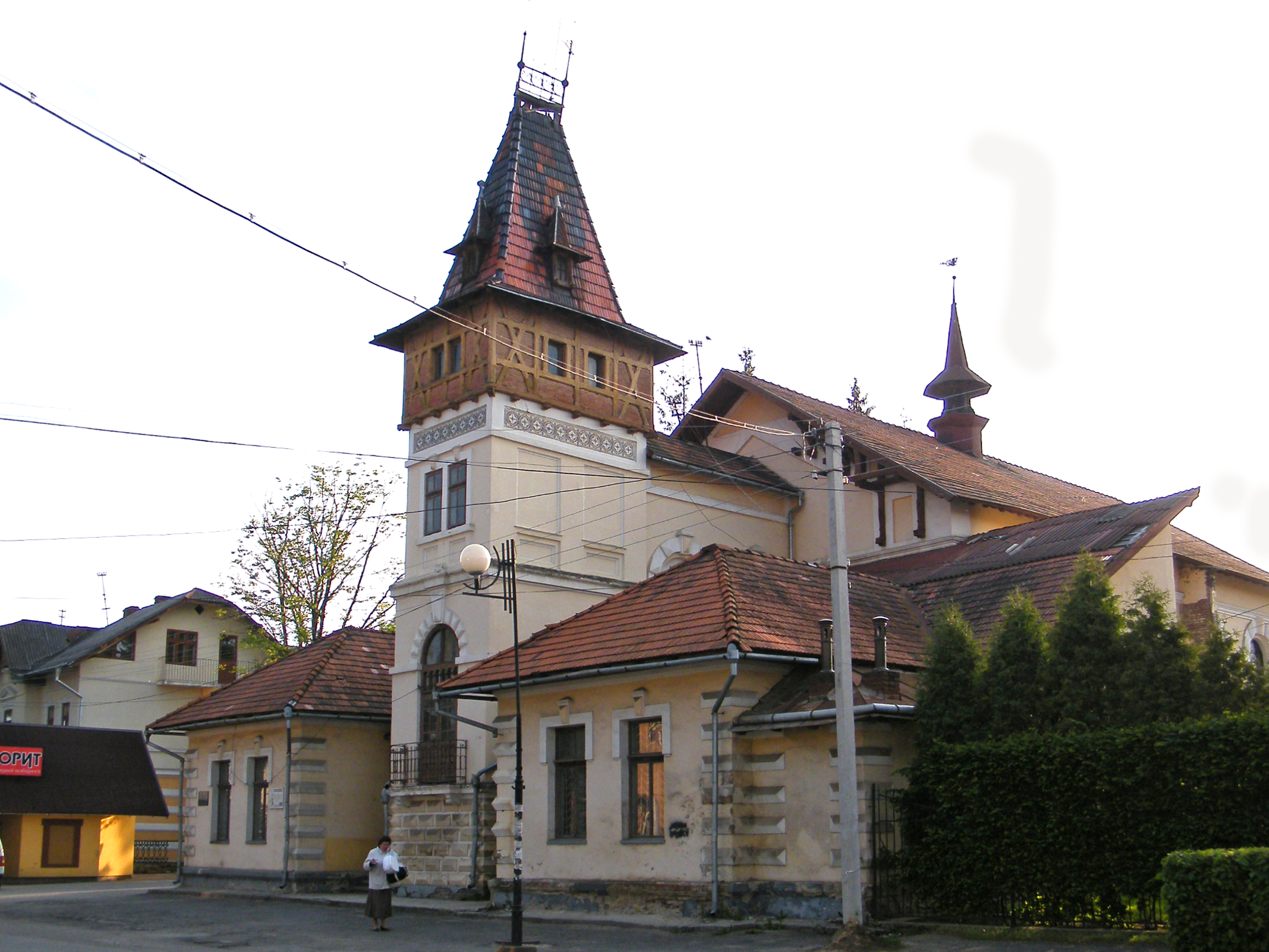 Бывший Дом офицеров